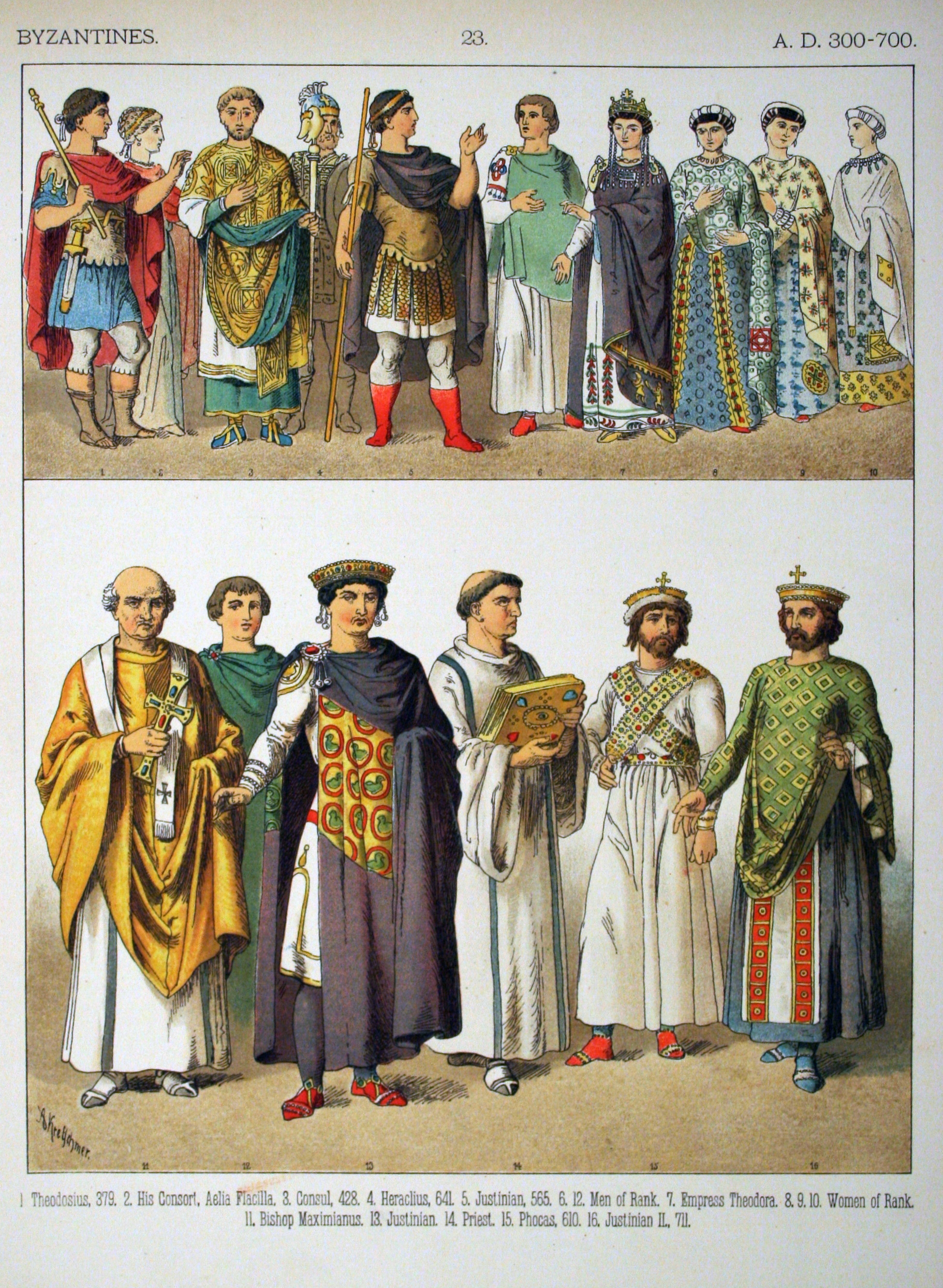 A.D. 300-700, Byzantines